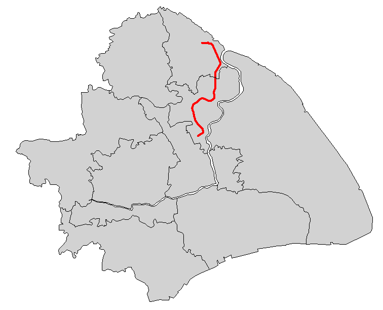 上海轨道交通3号线简图 本地图的底图不表示上海市全部所辖区域 因版面关系，上海市所辖之崇明岛、长兴岛等与本线路无关的离岛未在本图中表示。